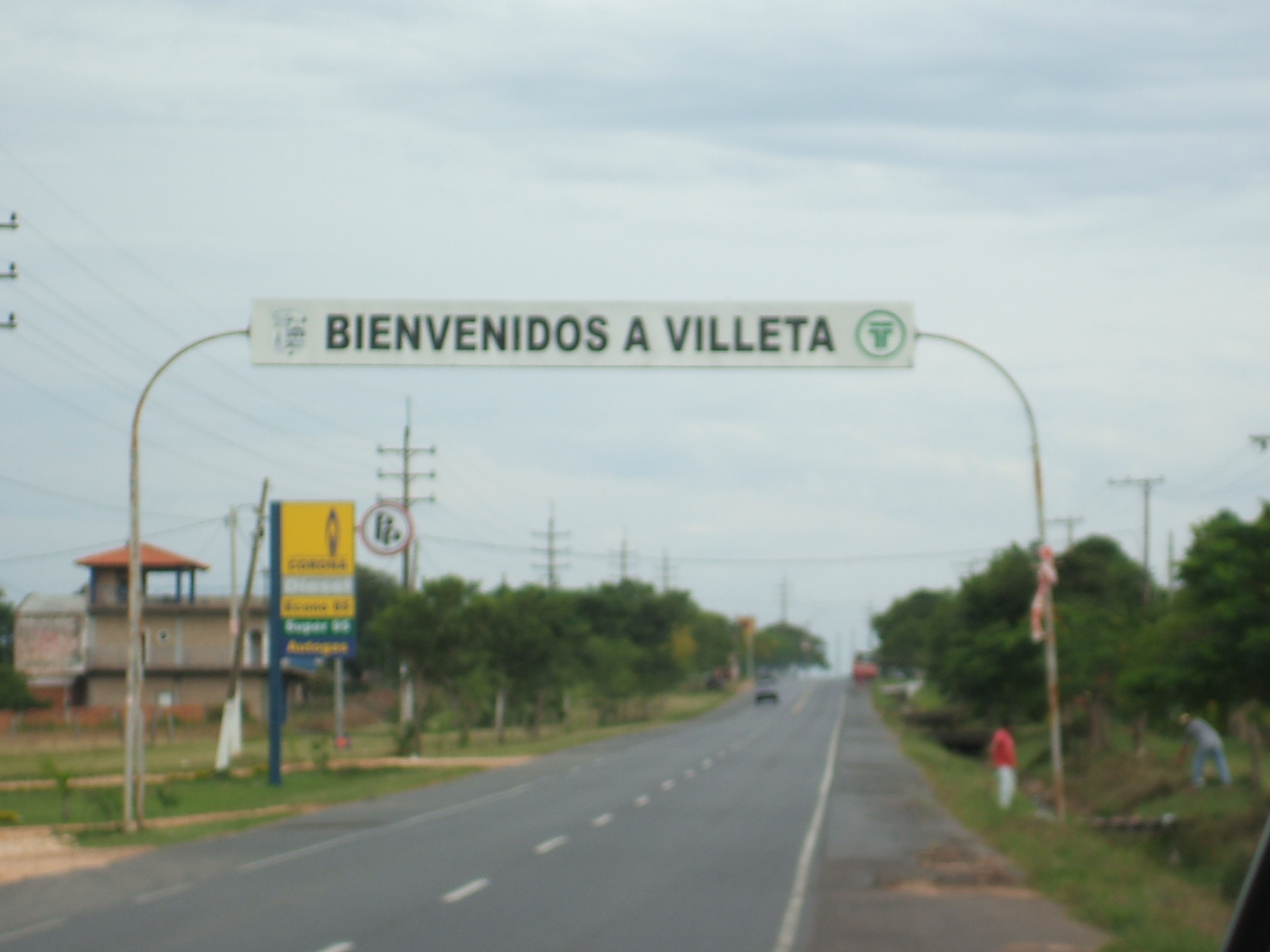 Bienvenidos a Villeta